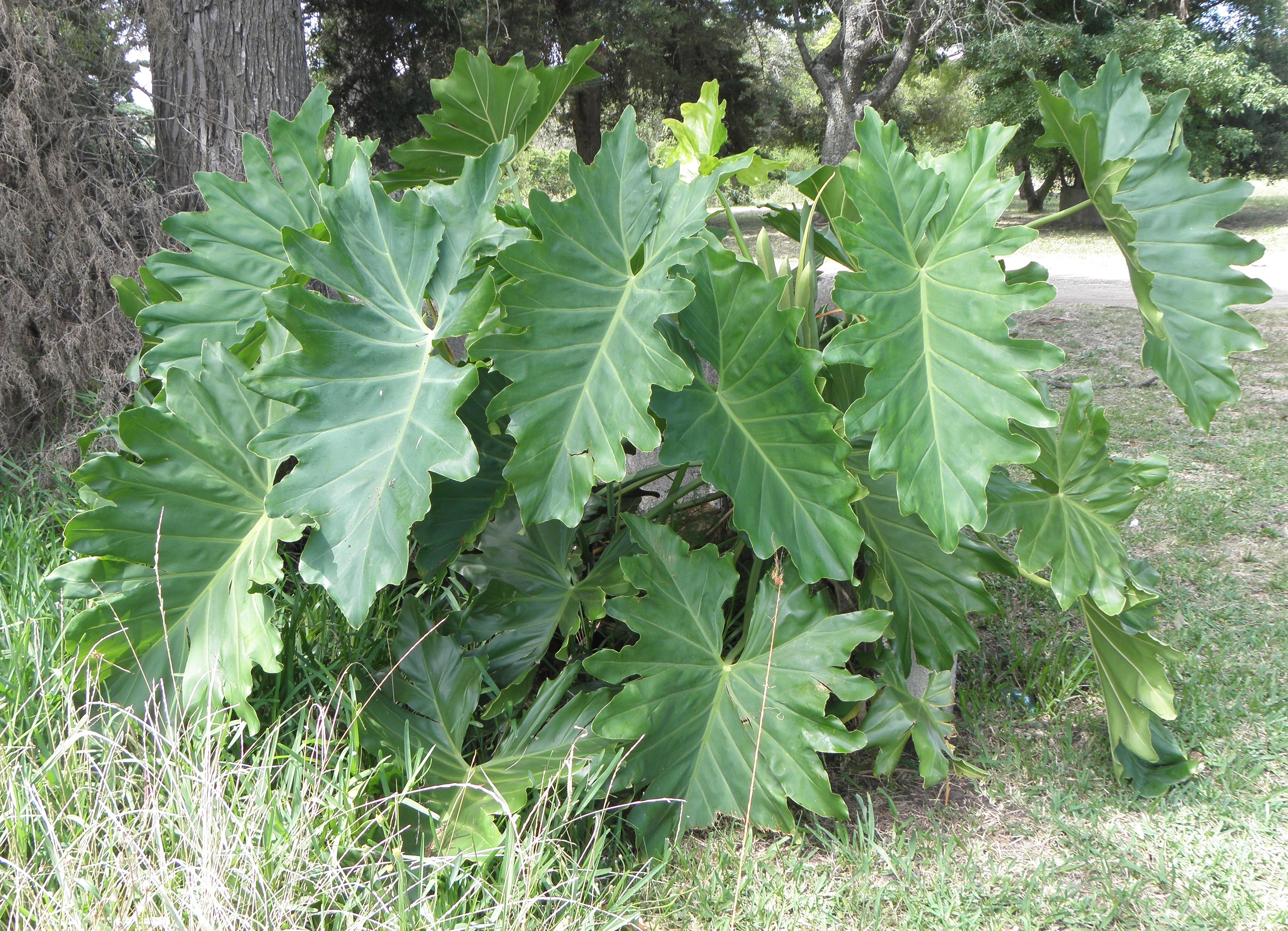 Güembé (Philodendron undulatum) cultivado en Uruguay.